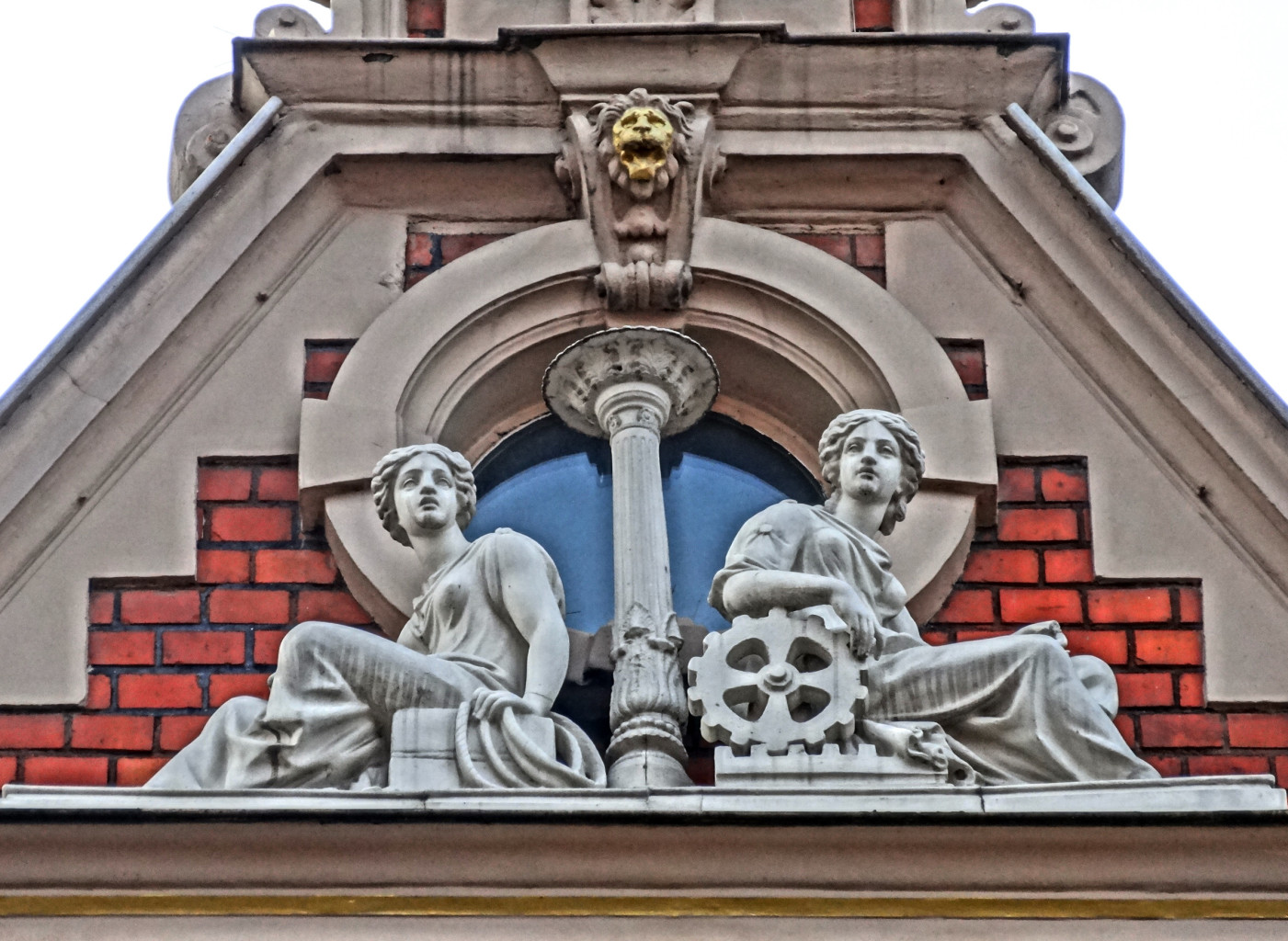 Kamienica przy ul. Długiej 24 w Bydgoszczy (1770)